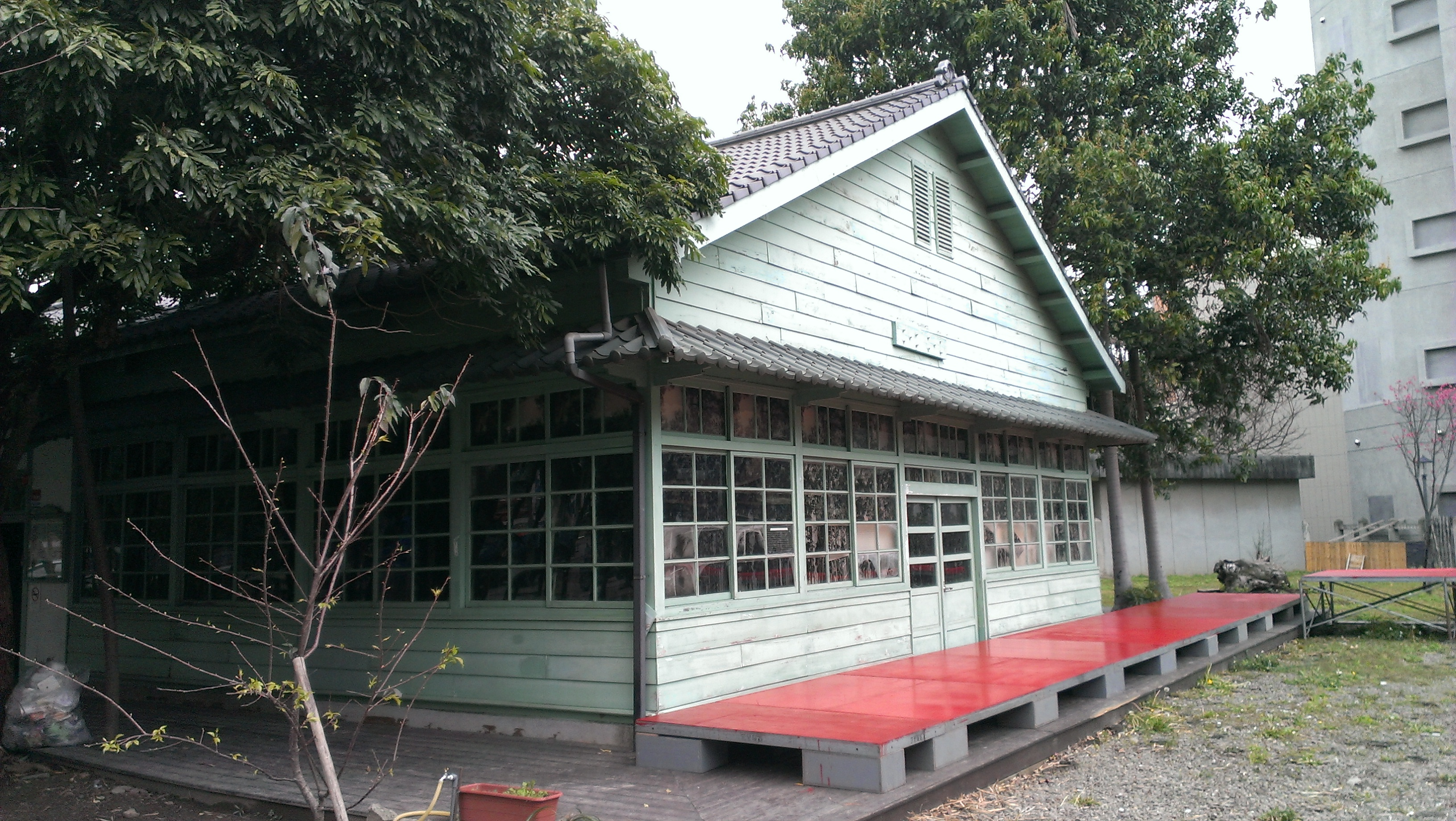 竹東林業展示館建築